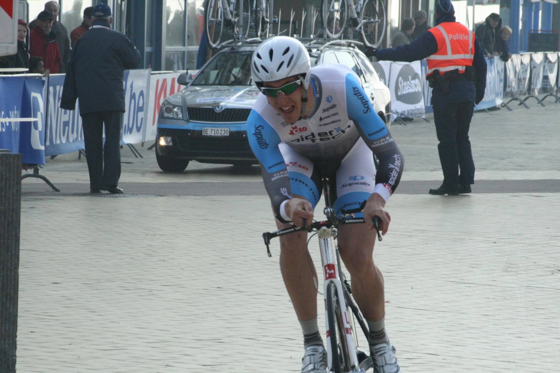 Driedaagse van West-Vlaanderen 2011, proloog in Middelkerke